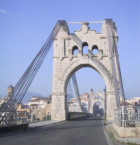 Le pont supendu à Amposta Auteur:Beideler René